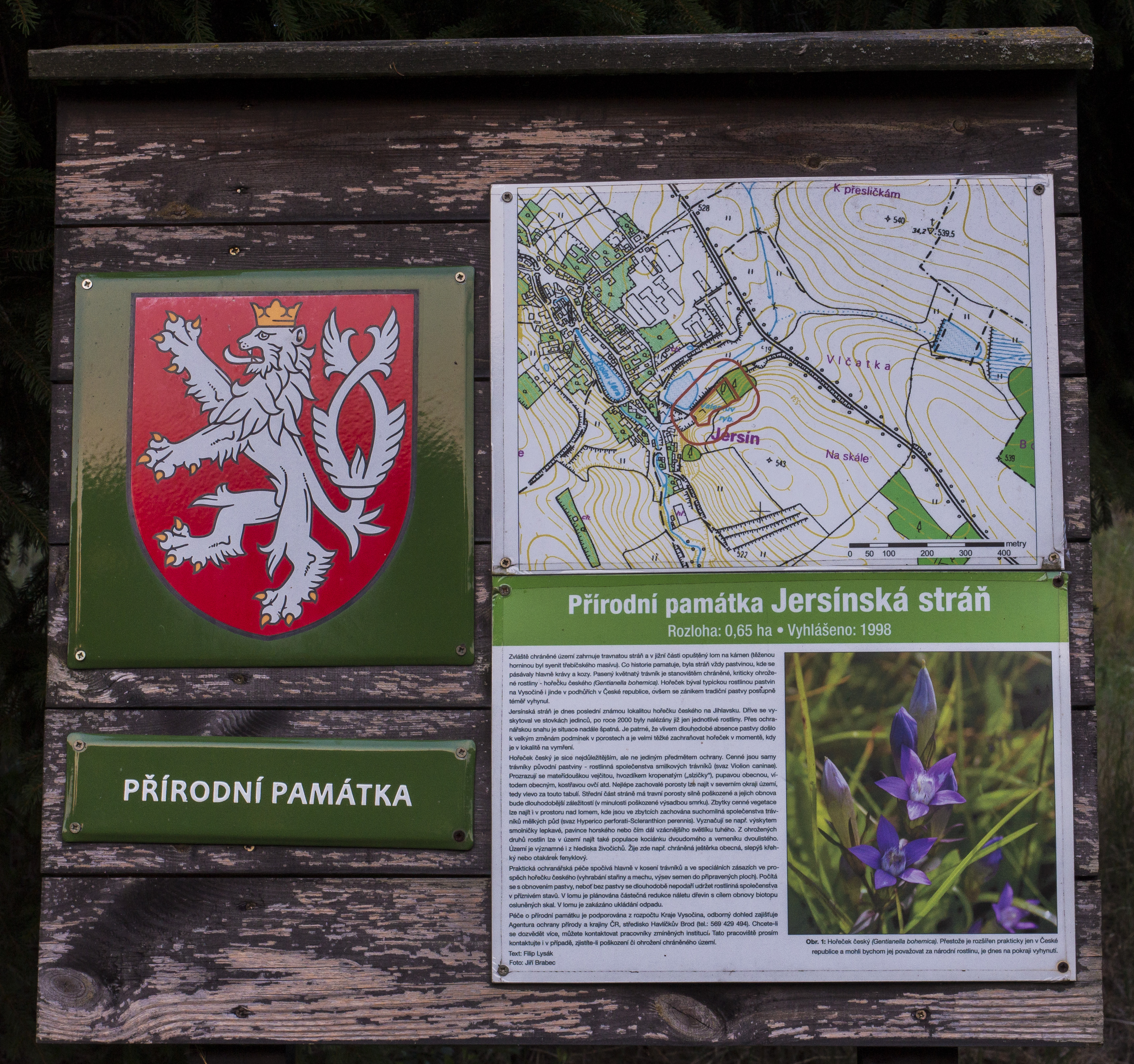 Informační tabule u Jersínské stráně